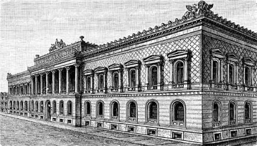 Reichsbankgebäude (existiert nicht mehr) in der Berliner Jägerstraße um 1900